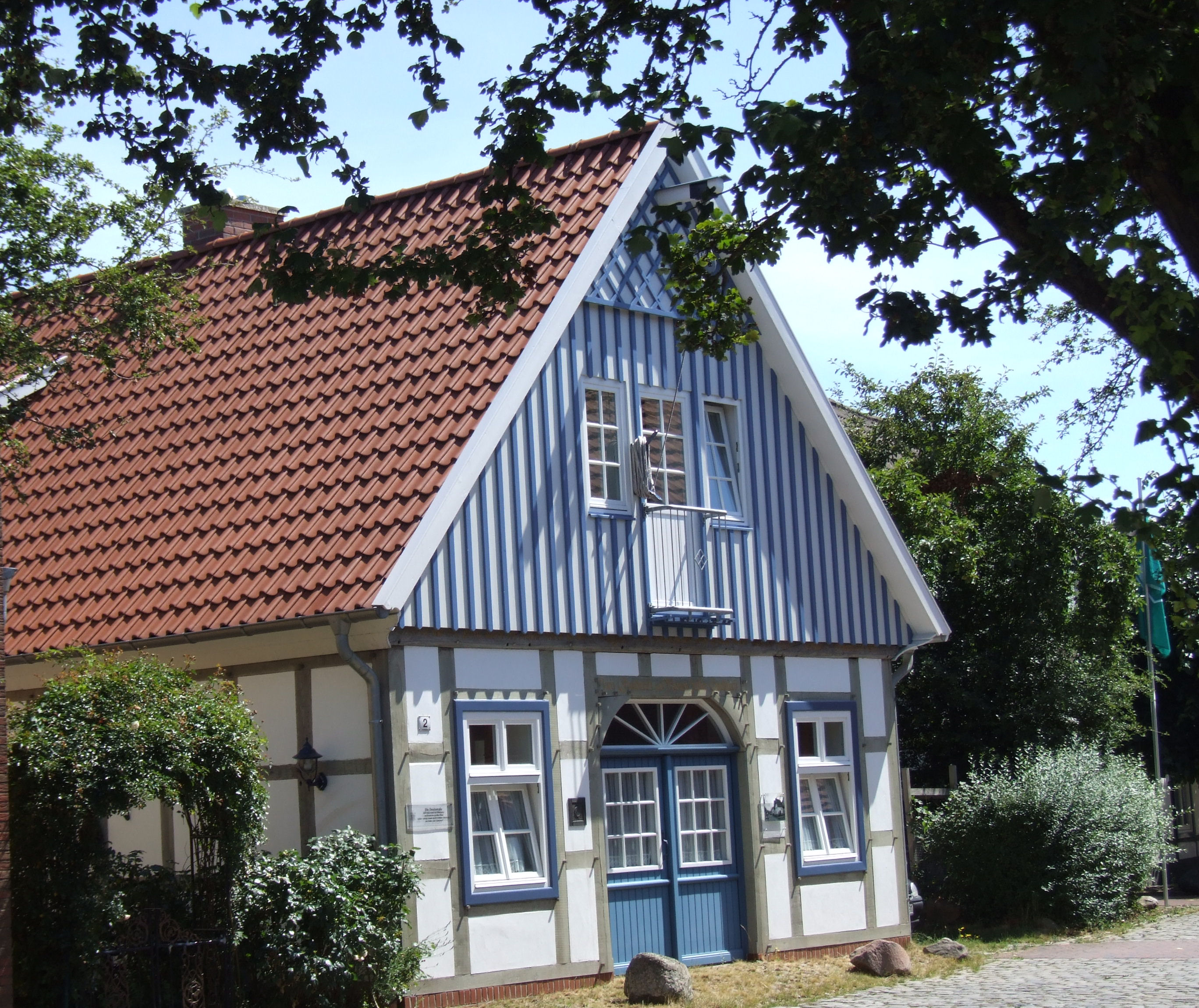 Quakenbrück, Deichstraße 2